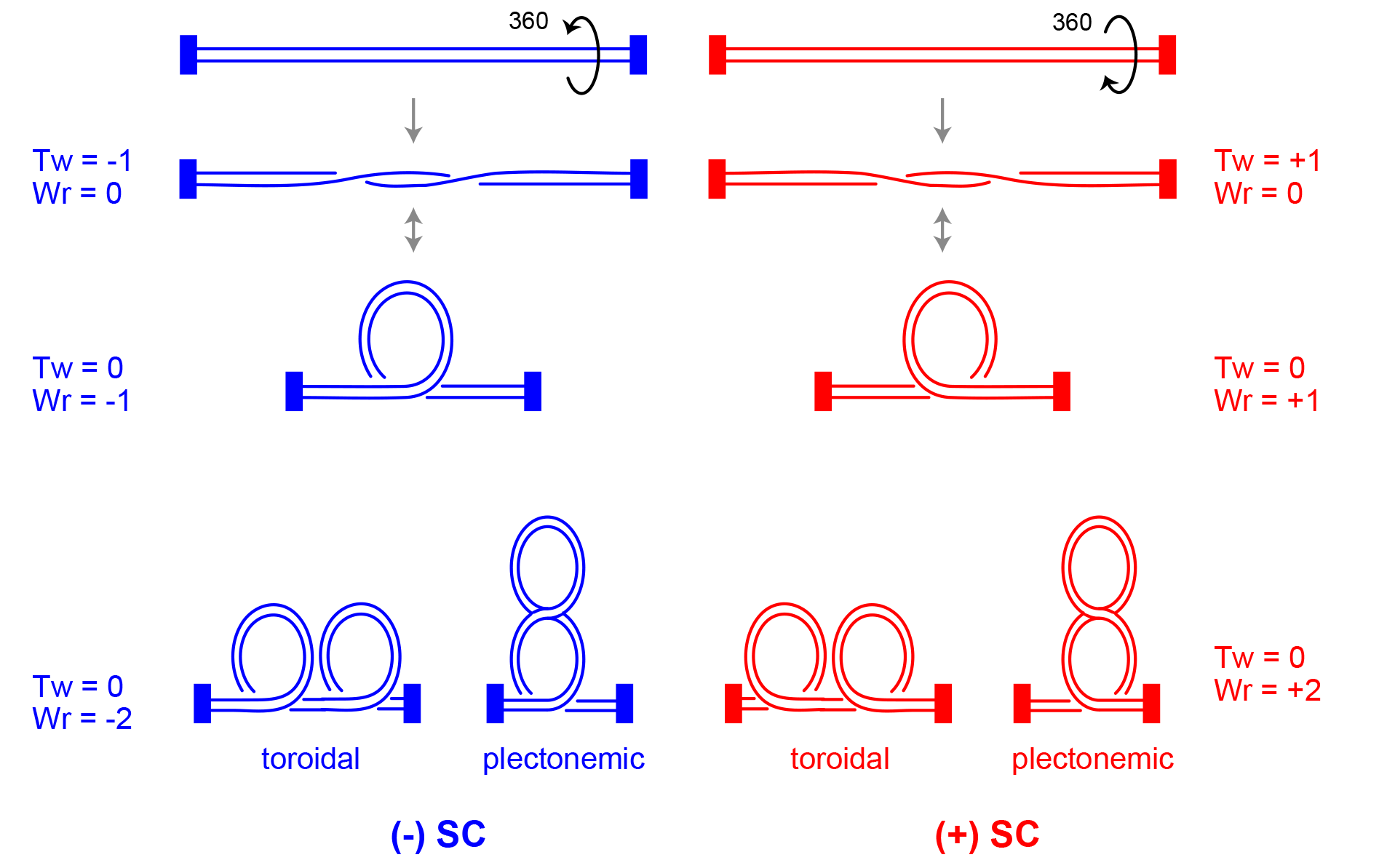 Supercoiling of linear DNA